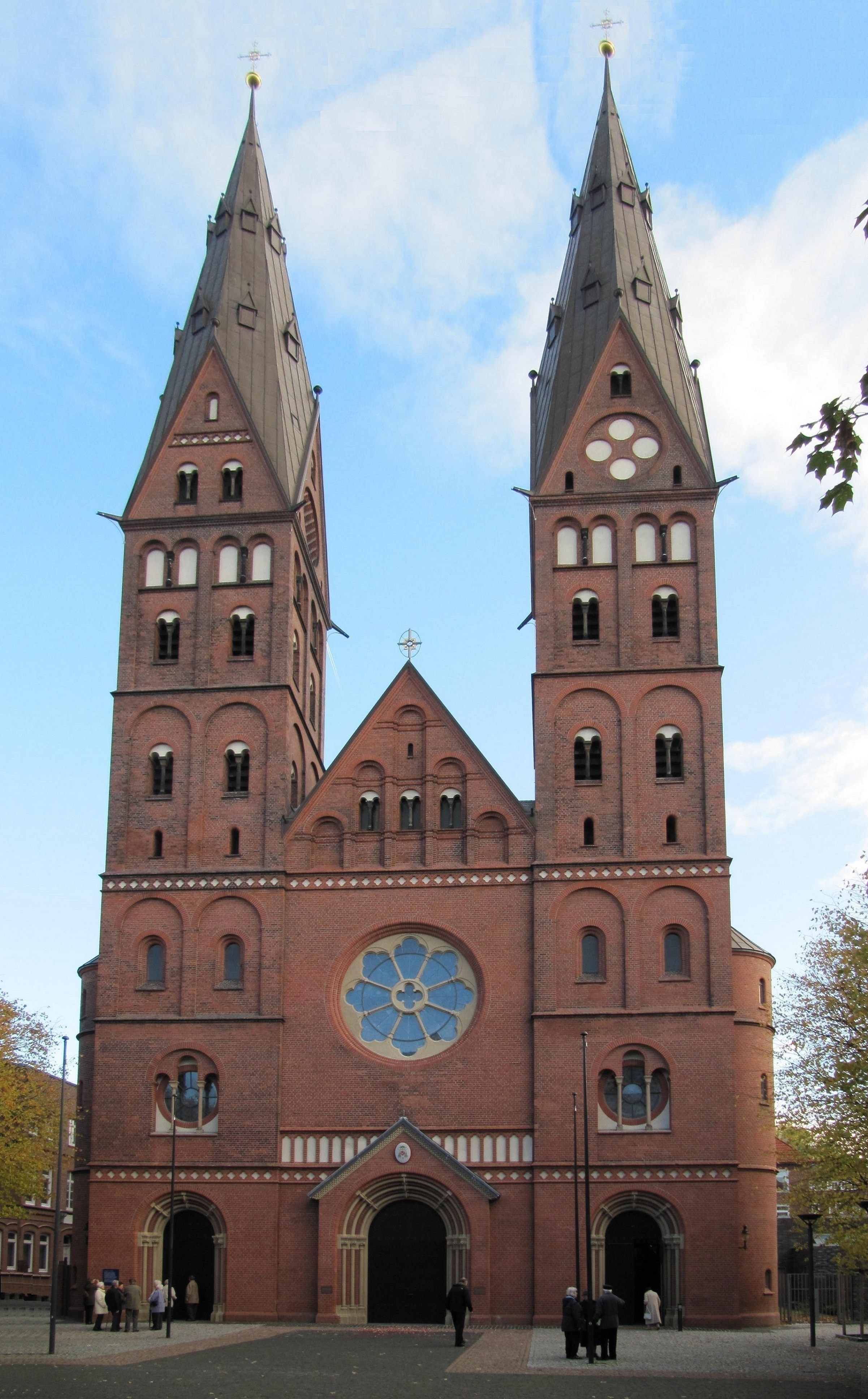 Die heutige Domkirche St. Marien in der Danziger Straße in St. Georg im neoromanischen Stil erbaut. Sie war damals das erste nach der Reformation als römisch-katholische Kirche neu erbaute Gotteshaus in Hamburg.This is a photograph of an architectural monument.